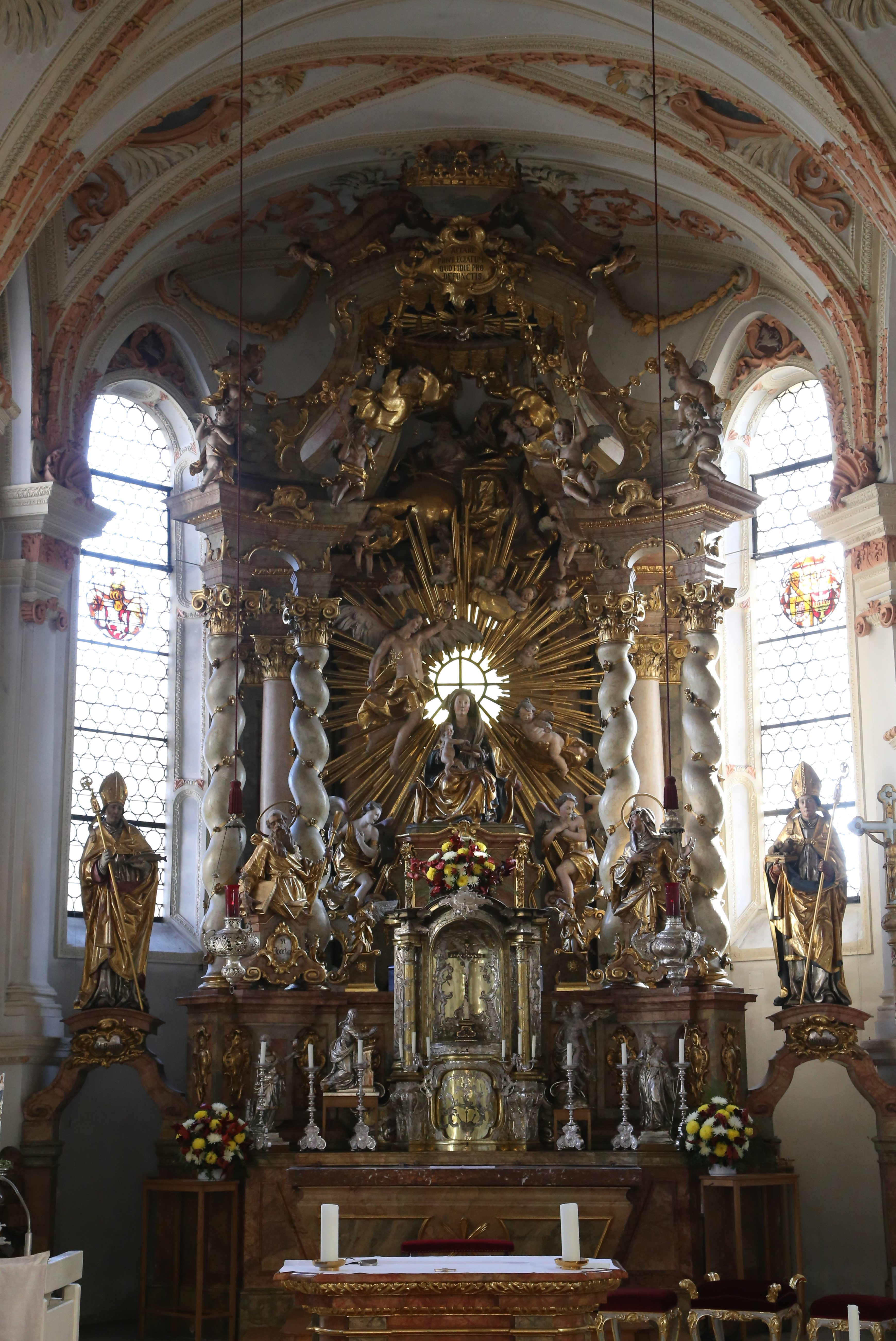 St. Maria Thalkirchen, München